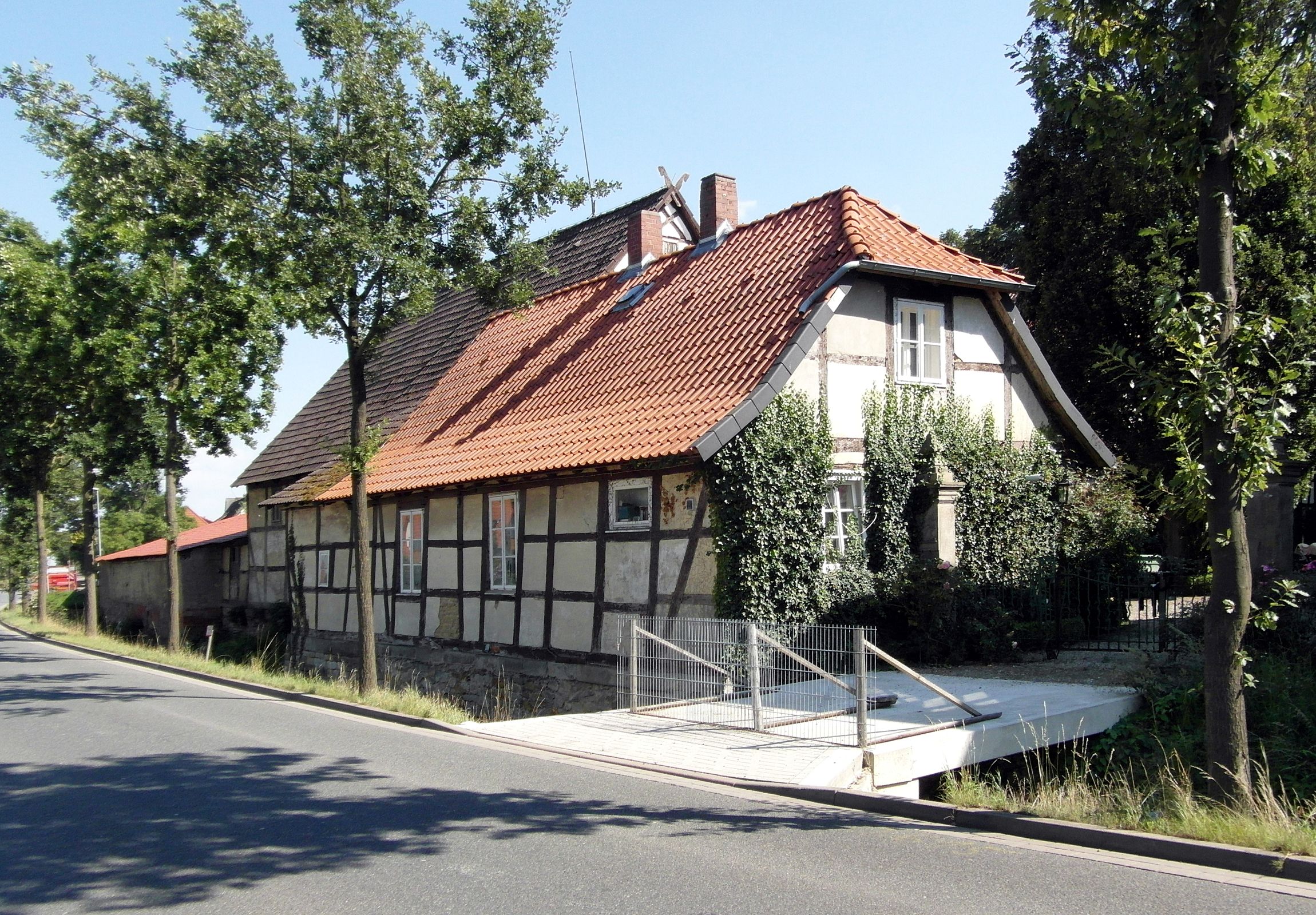 Gut (genannt Gut III) Hannoversche Straße 44 (bzw. 42a, je nach Karte) im Springer Stadtteil Gestorf.